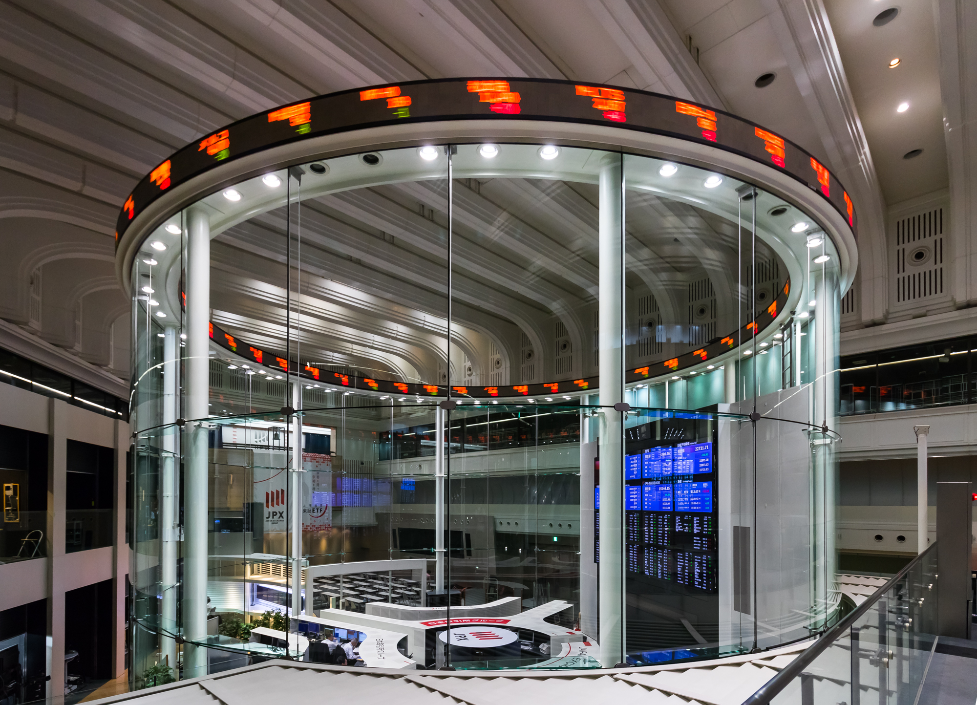 東京証券取引所のメインルーム.